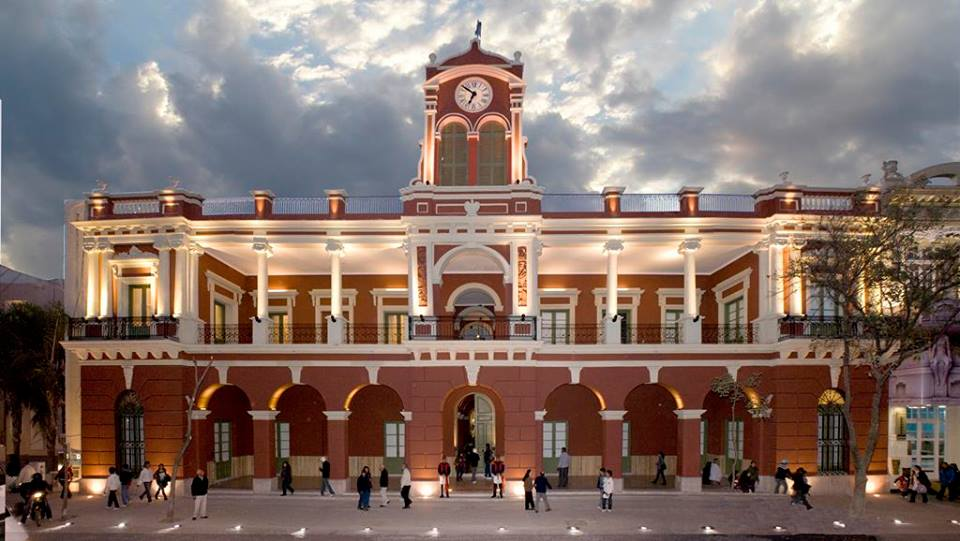 Veni a conocer mi provincia .